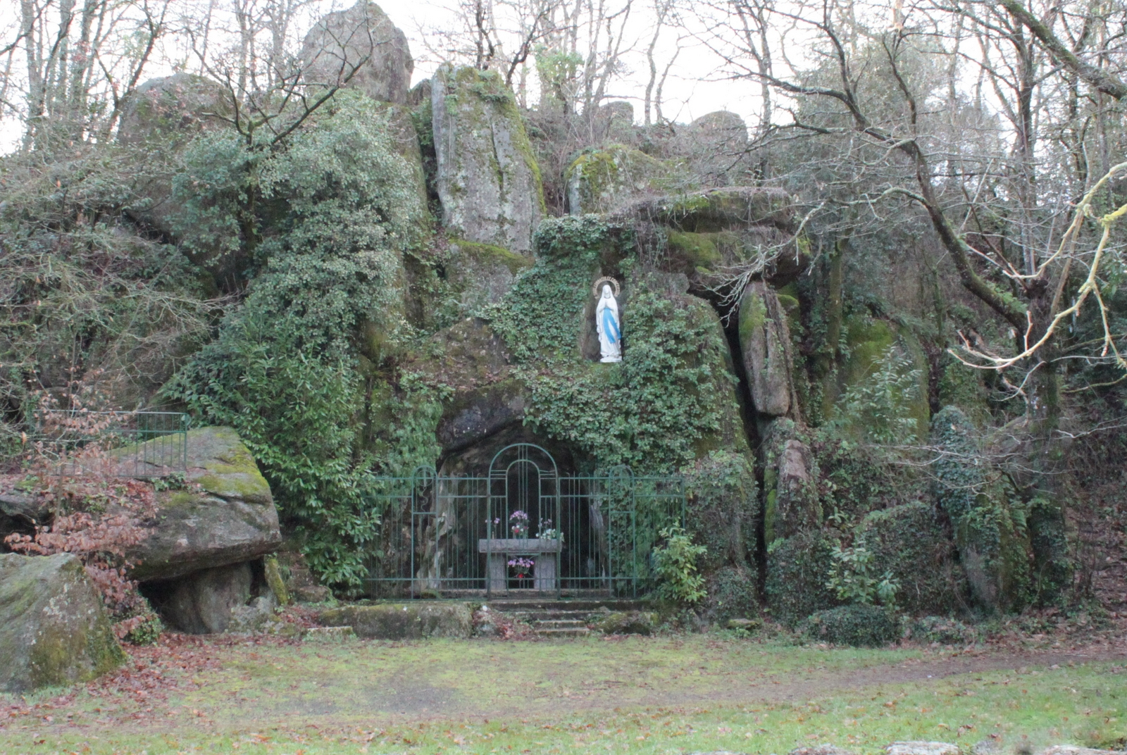 La Grenotière, Fr-85-Cugand.